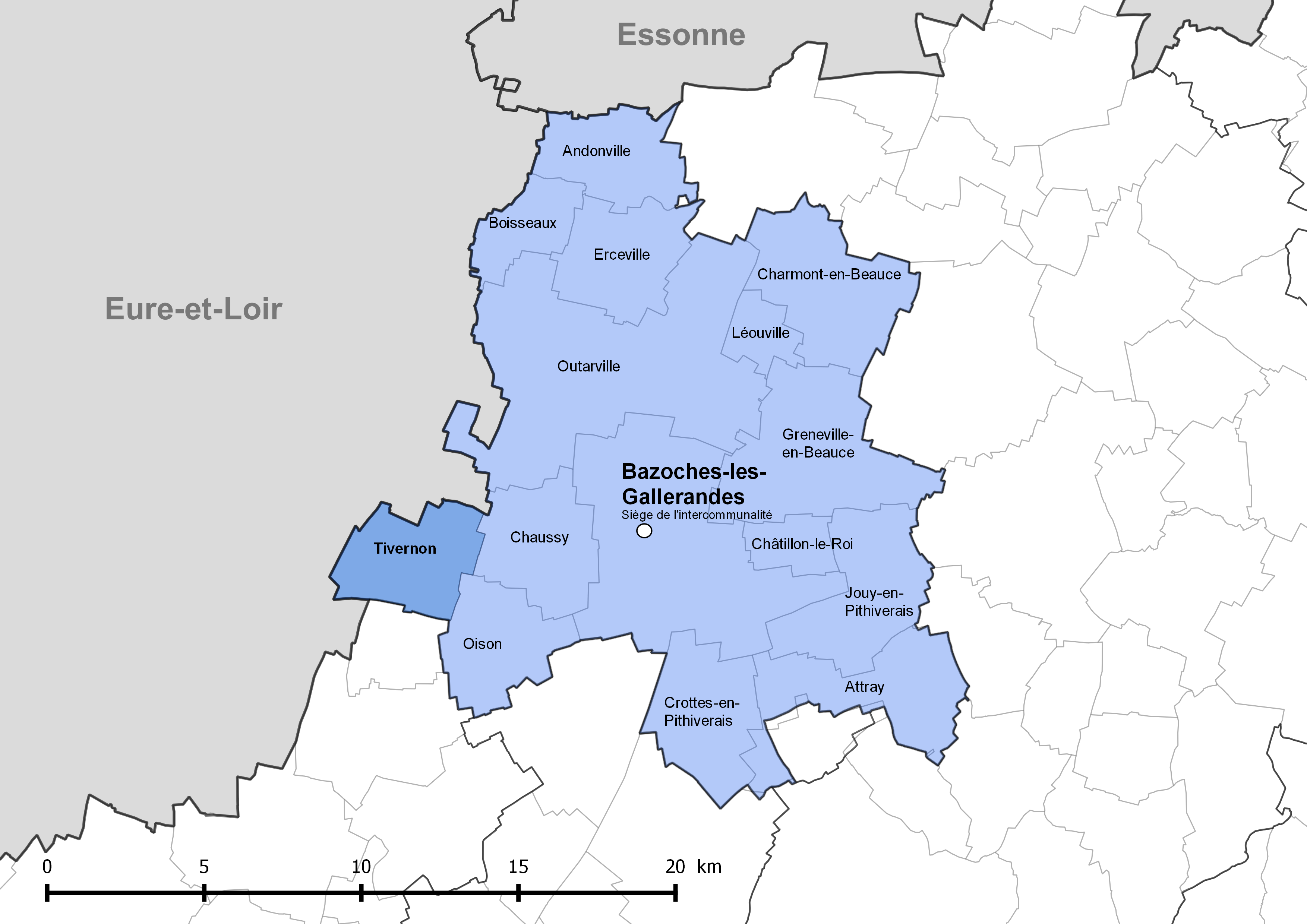 Périmètre de la communauté de communes de la Plaine du Nord Loiret - Situation de la commune de Tivernon.